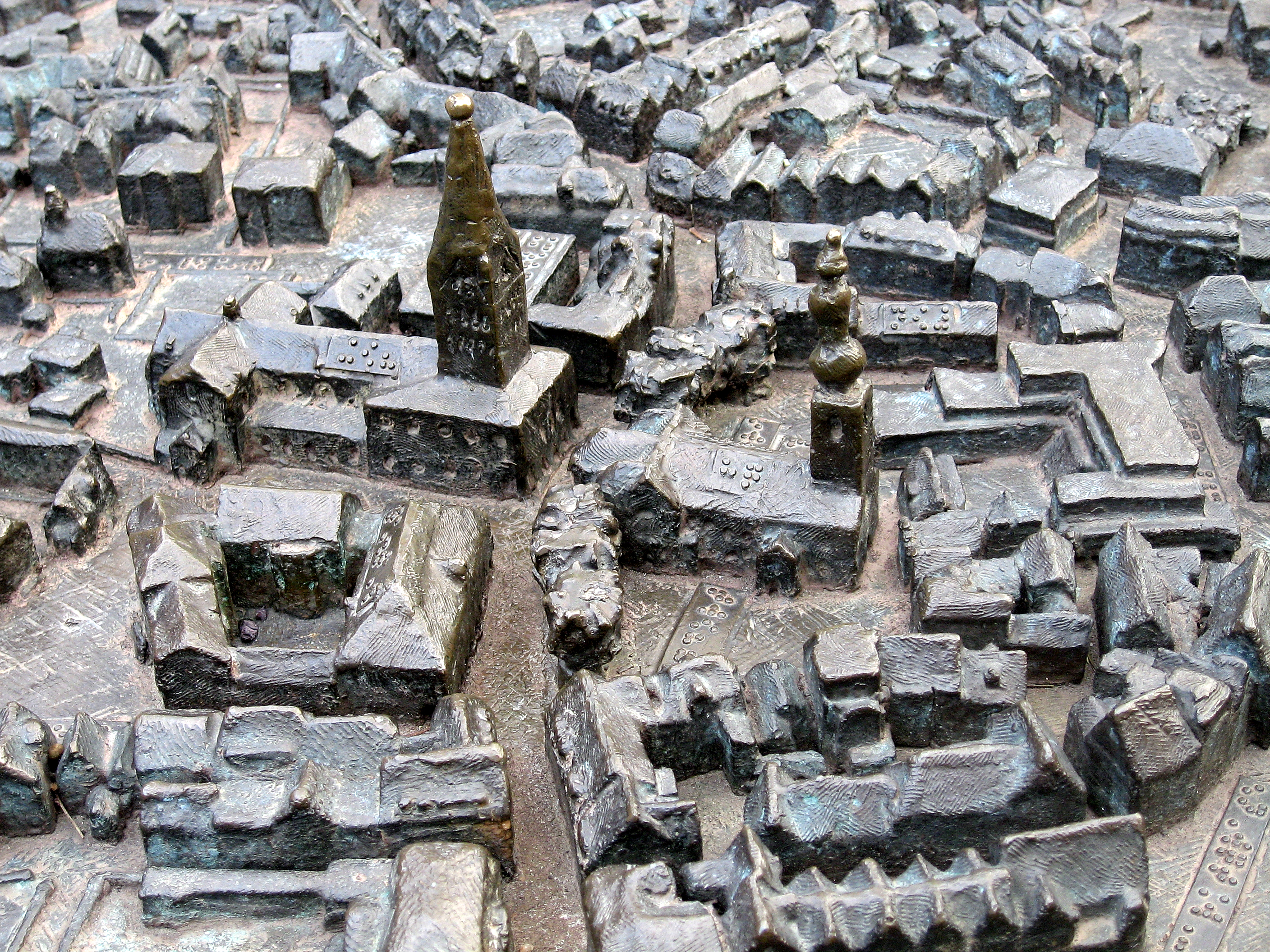 Soest, Bronzeskulptur der Stadt (von Bildhauer Egbert Brörken)